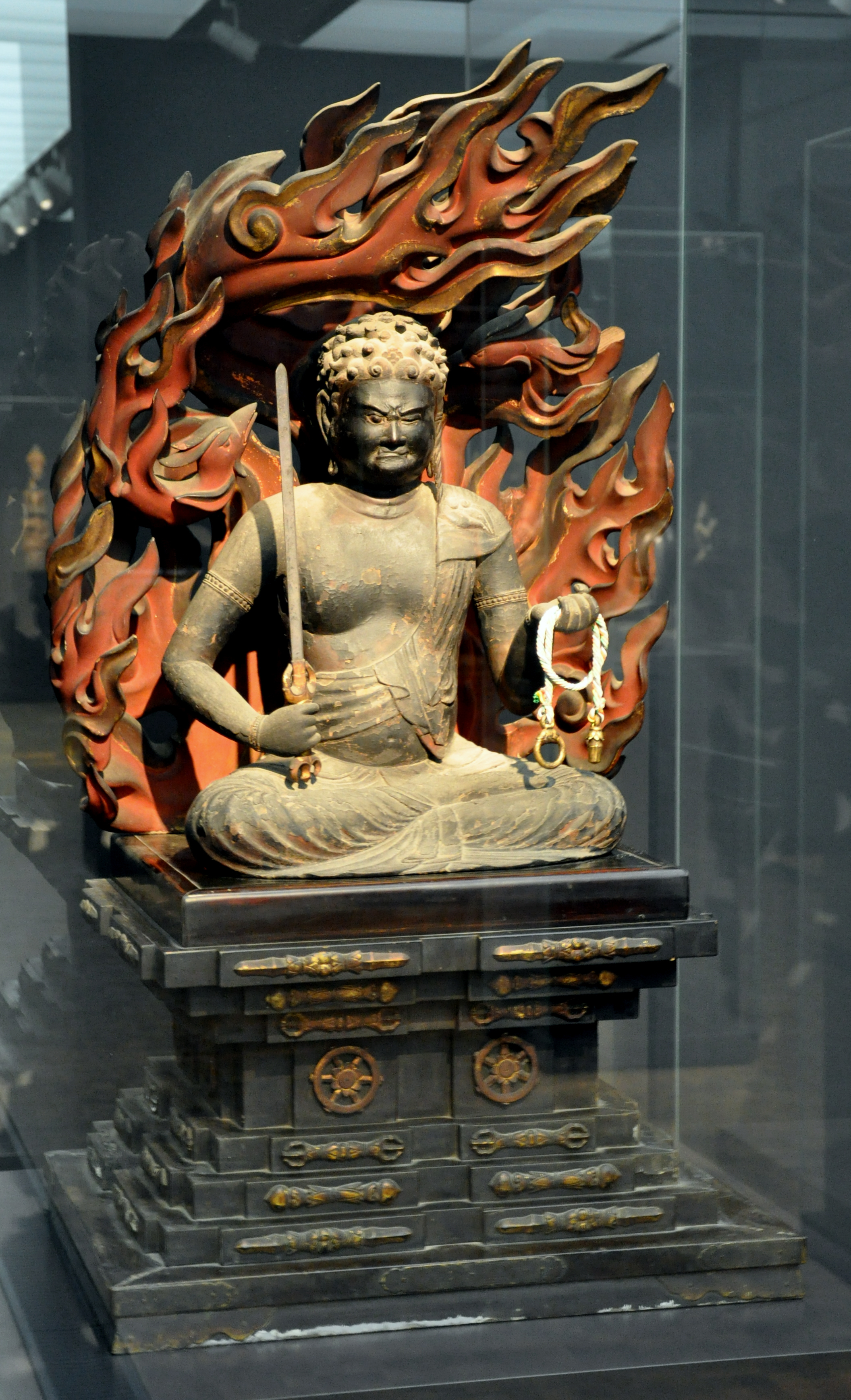 Fudo Myoo (Acala), König des mystischen Wissens; Japan, Fujiwara-Zeit, Ende 12. Jahrhundert; Zypressenholz mit Resten farbiger Fassung Museum Rietberg, Zürich; Geschenk der Novartis AG; Inv. Nr. RJP 21